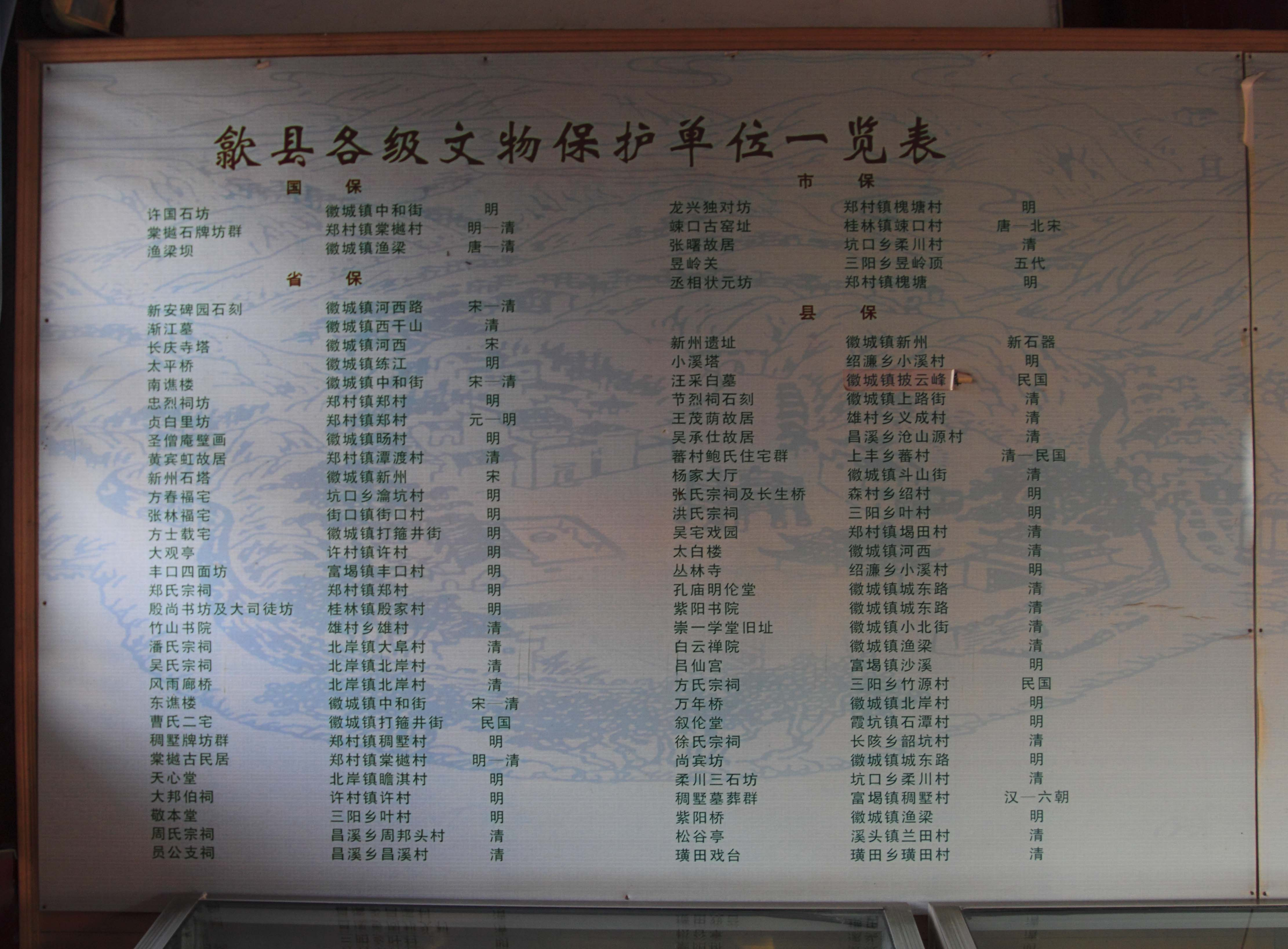 安徽省歙县各级文物保护单位一览表，藏于东谯楼上。